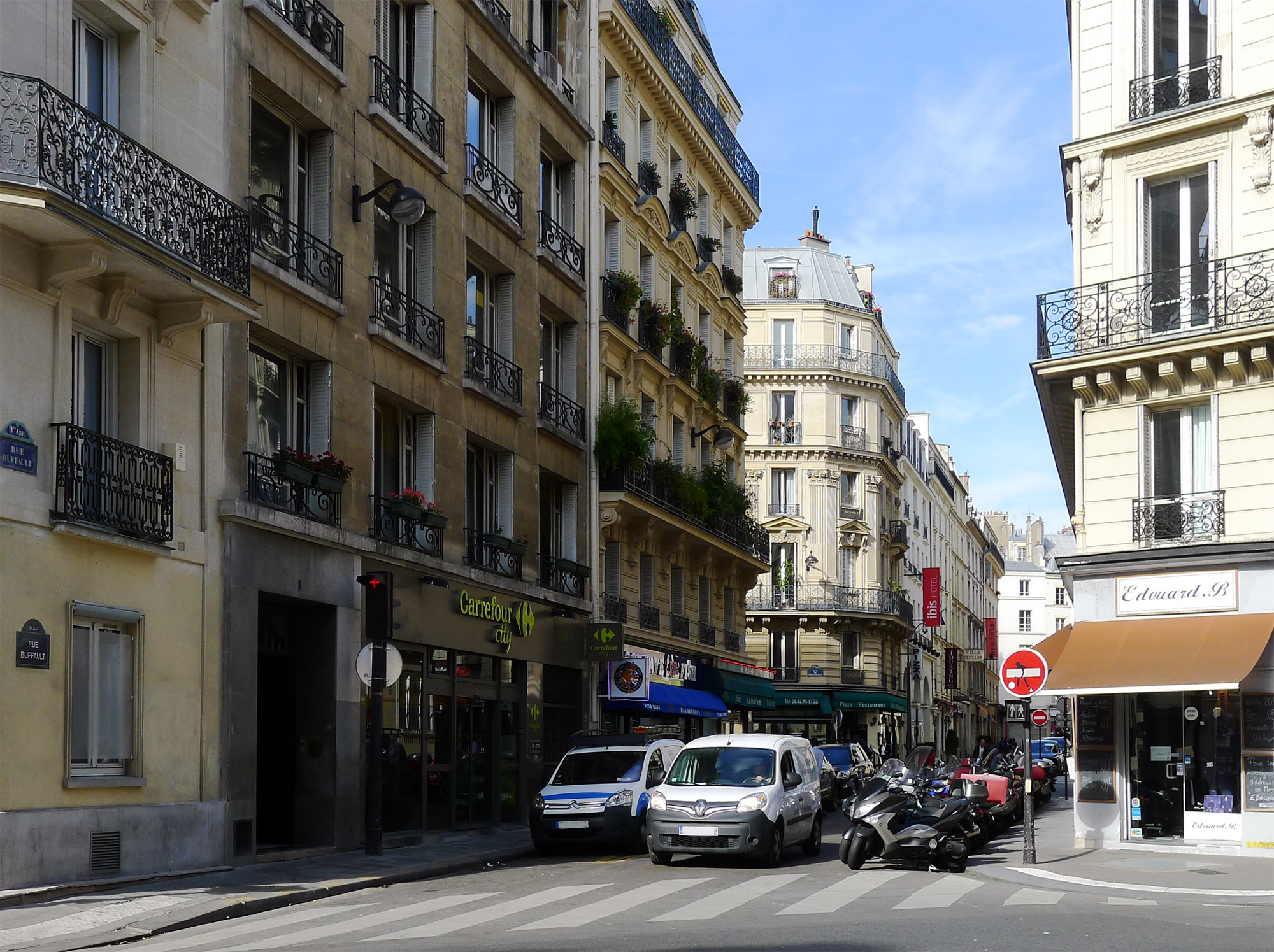 Rue Buffault - Paris IX